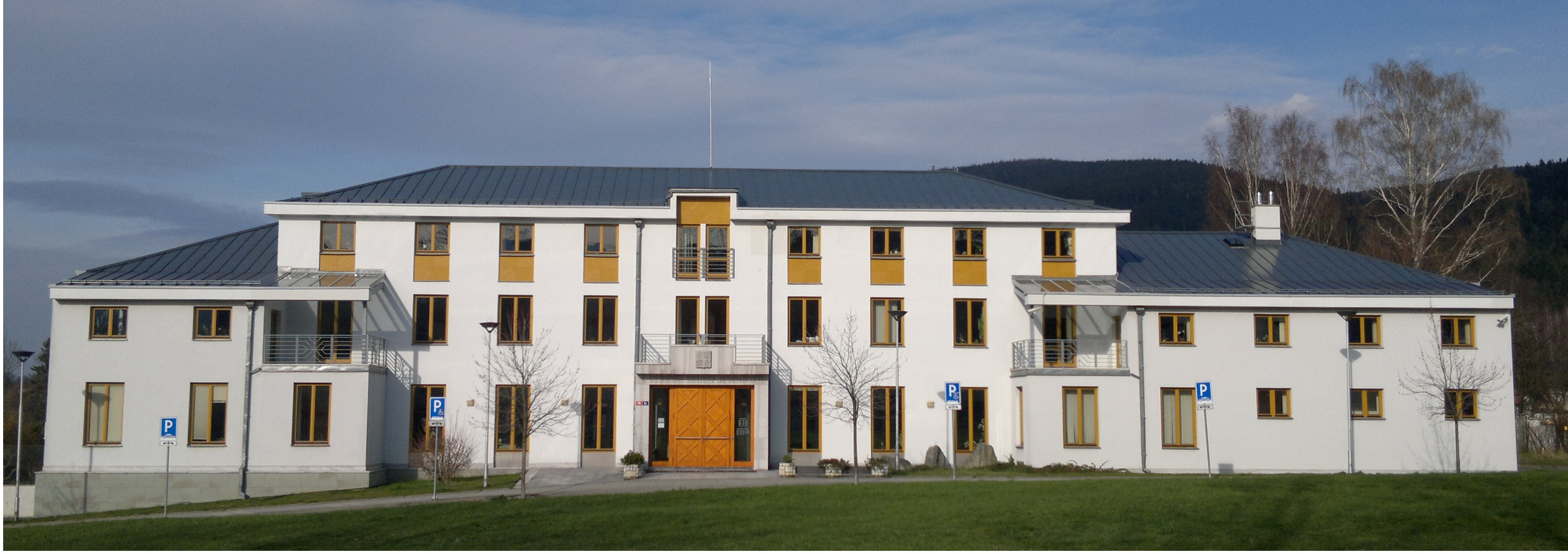 Okresní soud v Jeseníku, Dukelská 761/2a.